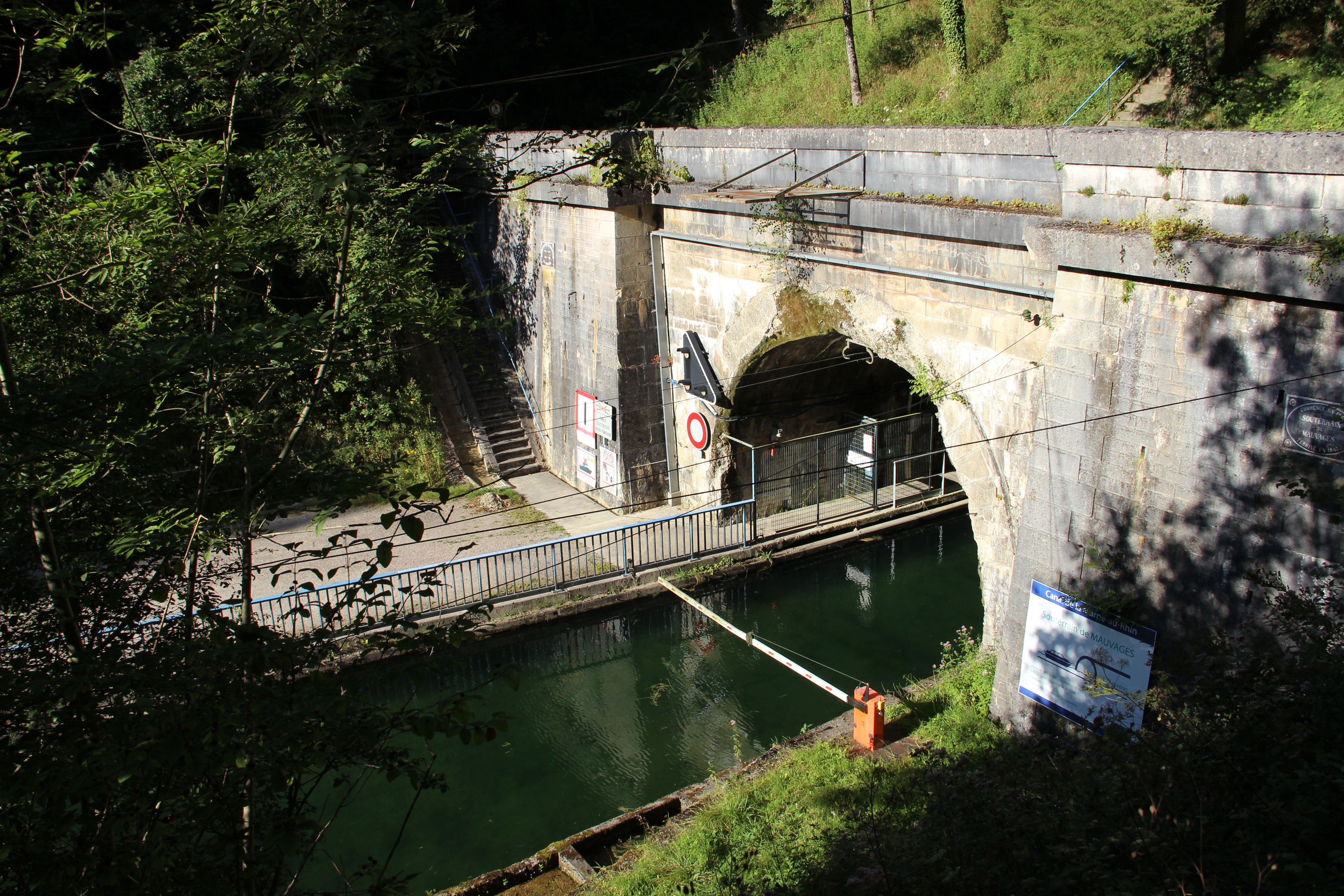 Tunnel de Mauvages - Coté Demange aux Eaux